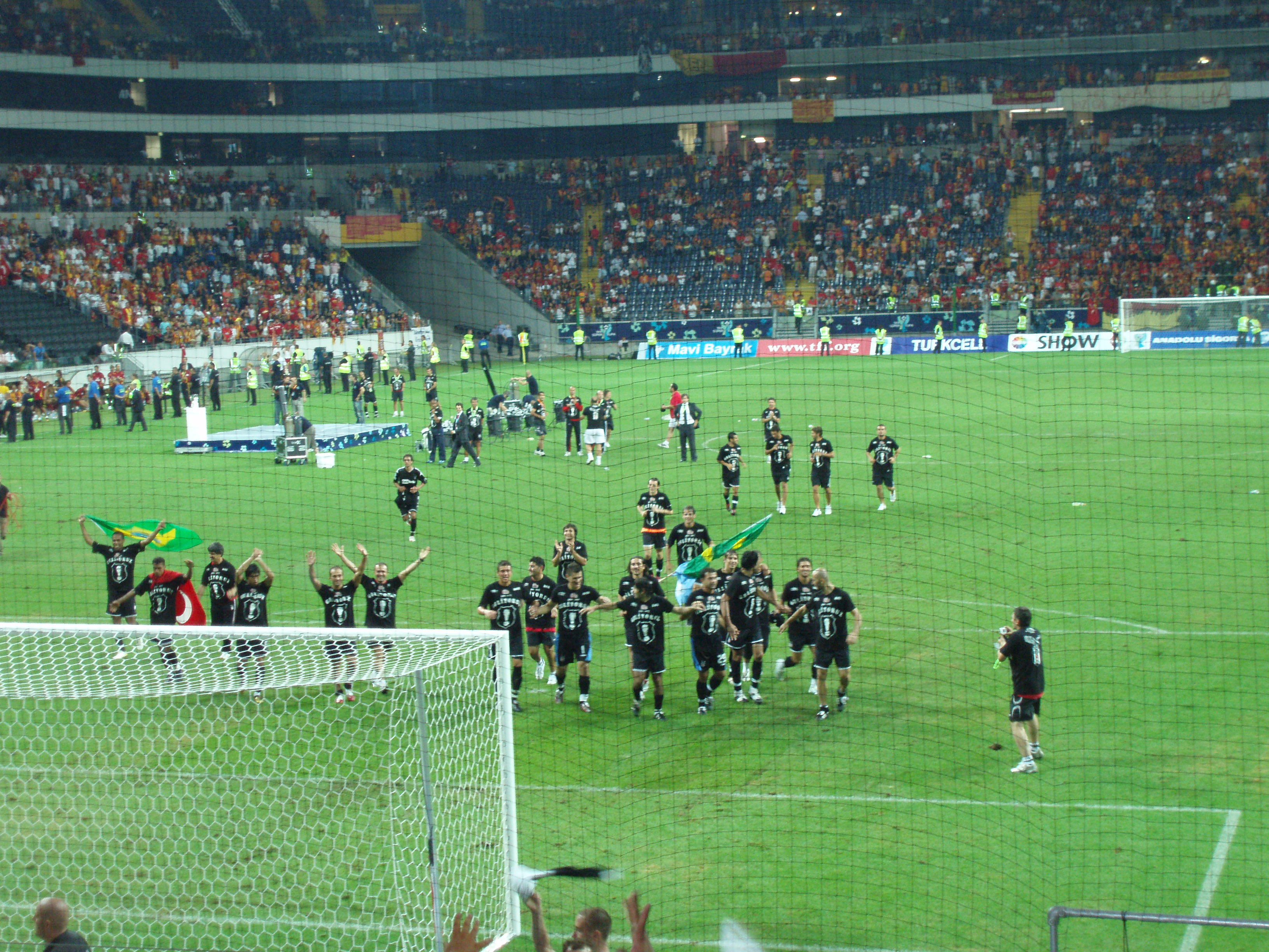 Türkischer Supercup 2006 (Besiktas - Galatasaray 1:0)